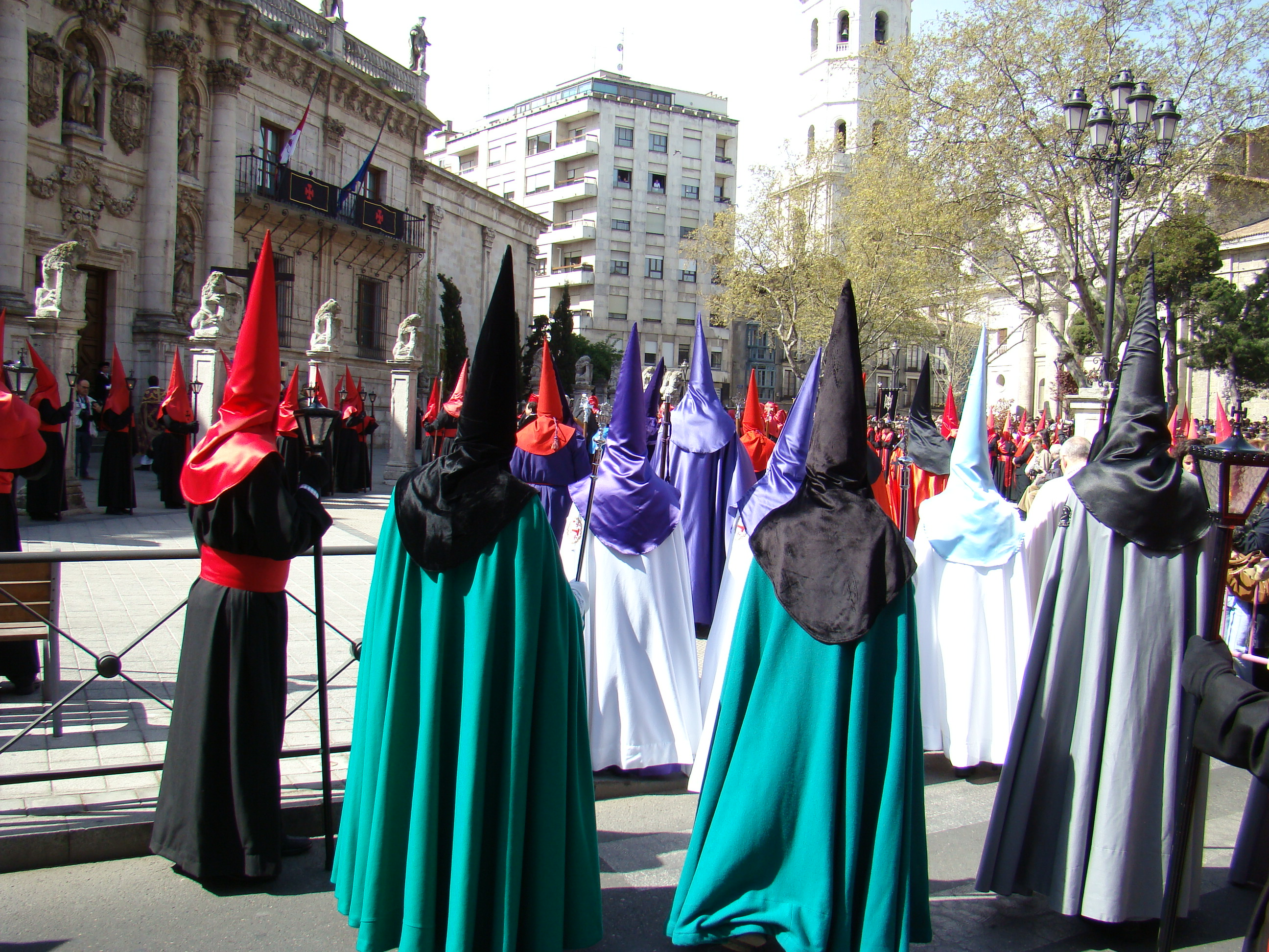 Valladolid (España). Cofrades en procesión al paso por la fachada de la Universidad.